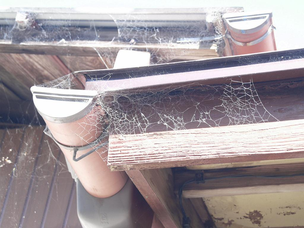 Badumna insignis Japanese name:kurogakejigumo：クロガケジグモ Date;2009,09.20;Tanabe City, Wakayama prefecture, Japan Author;Keisotyo